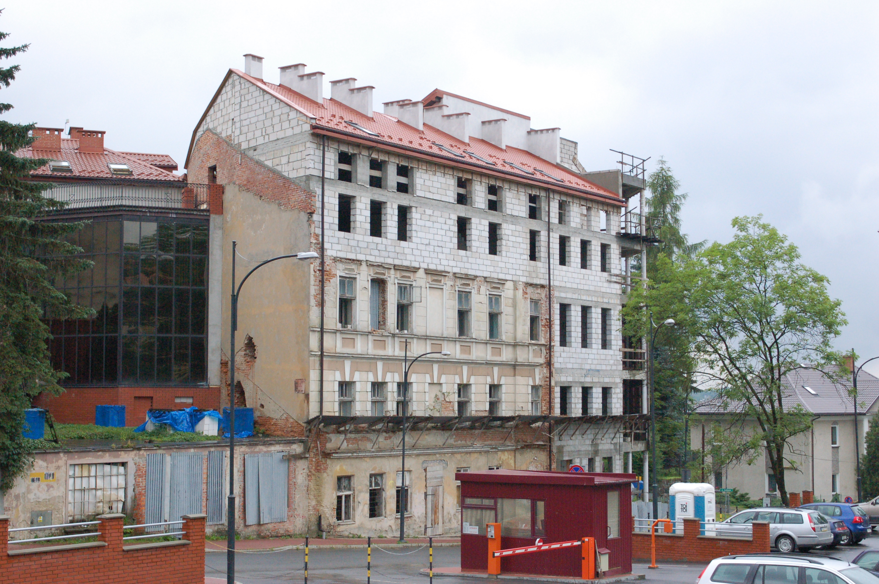 Sanok, Polen